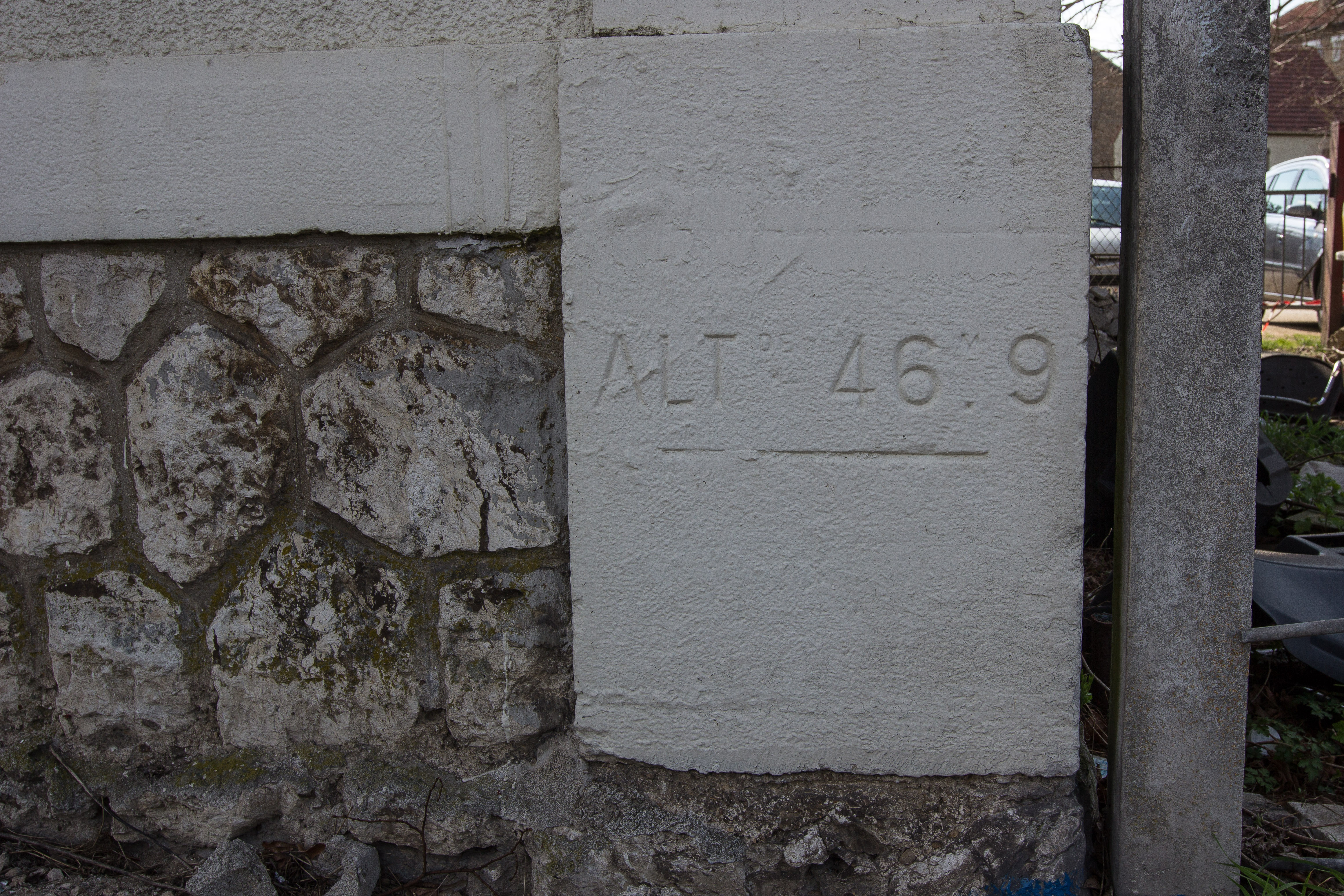 Gare de Villabé / Villabé / Essonne / France